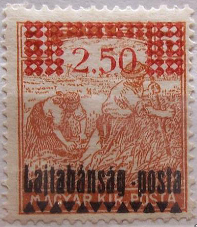 Почтовая марка Западной Венгрии из четвёртого выпуска, 1921